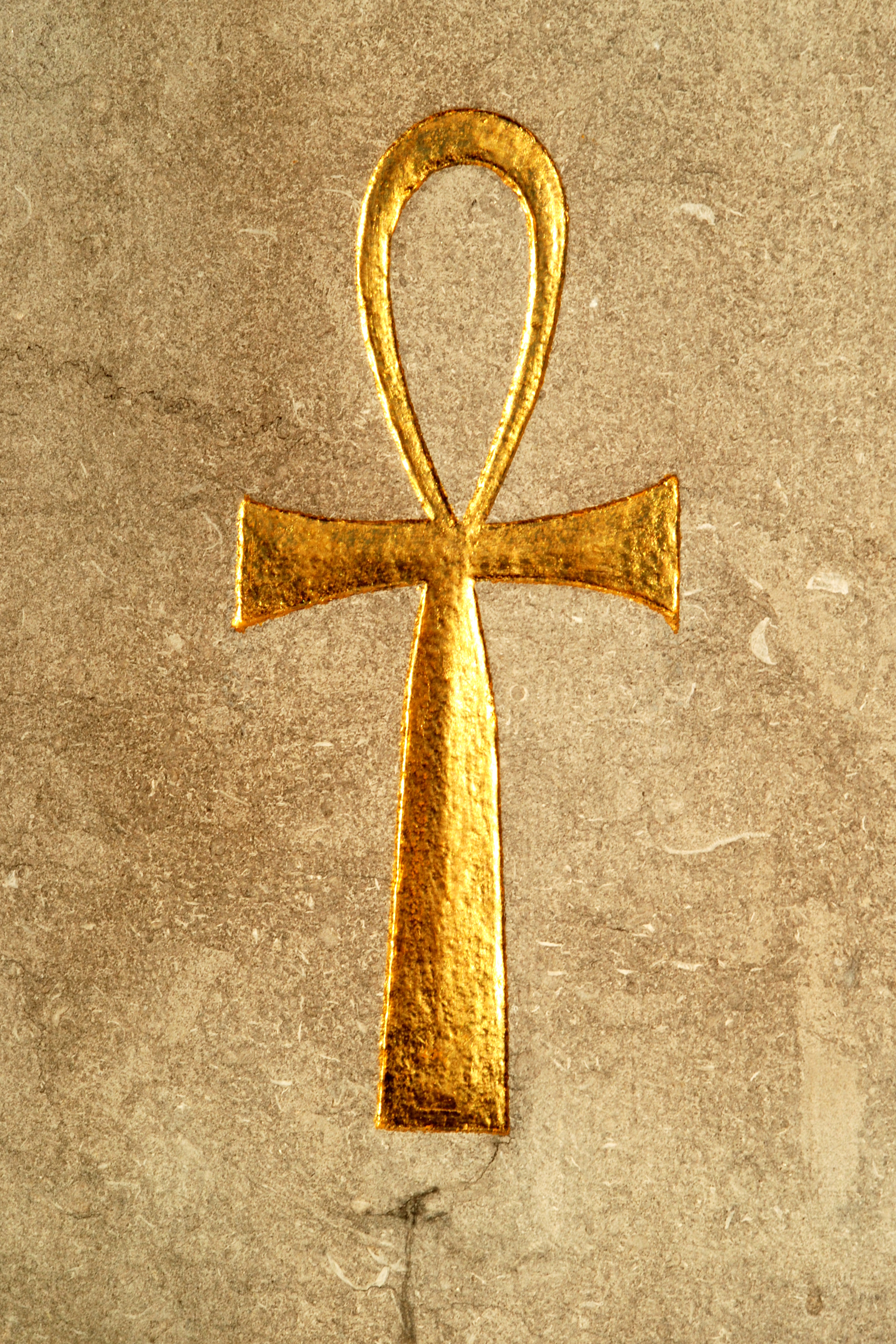 Belgique - Brabant wallon - Court-Saint-Etienne - Mausolée Goblet d'Alviella